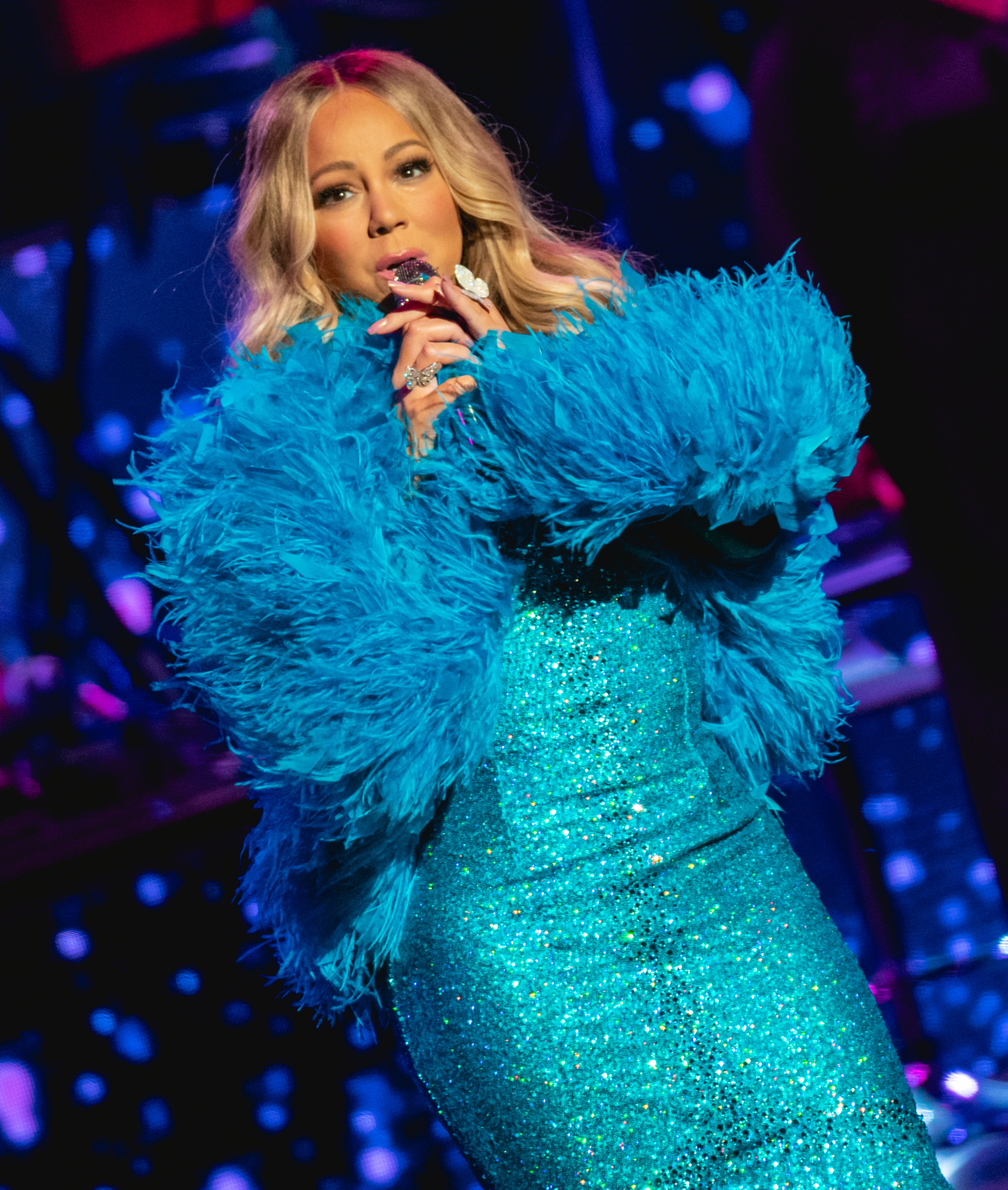 MariahRAH270519-60